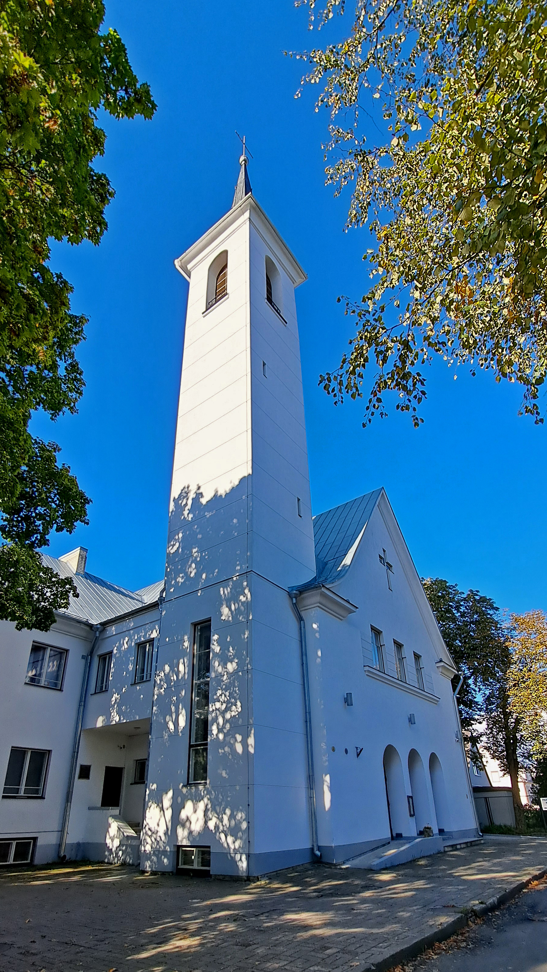 Tallinna Peeteli kirik